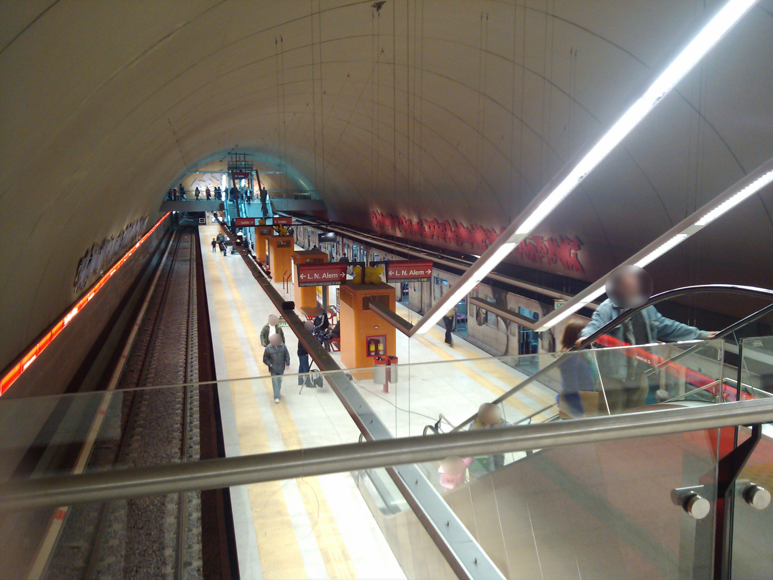 Vista desde arriba del andén de la estación Juan Manuel de Rosas de la línea B de subterráneo de la ciudad de Buenos Aires